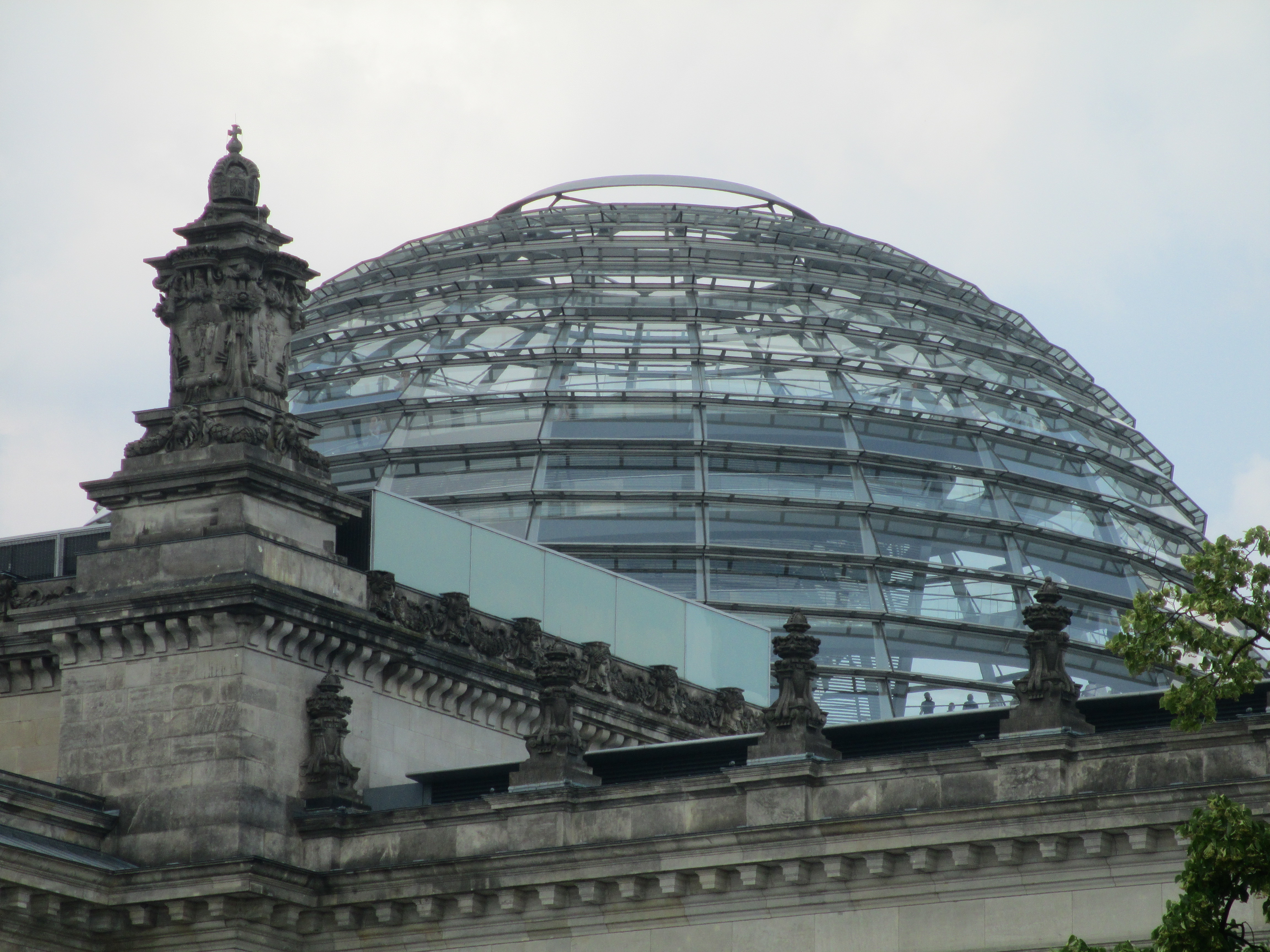 כיפת הזכוכית של הרייכסטאג